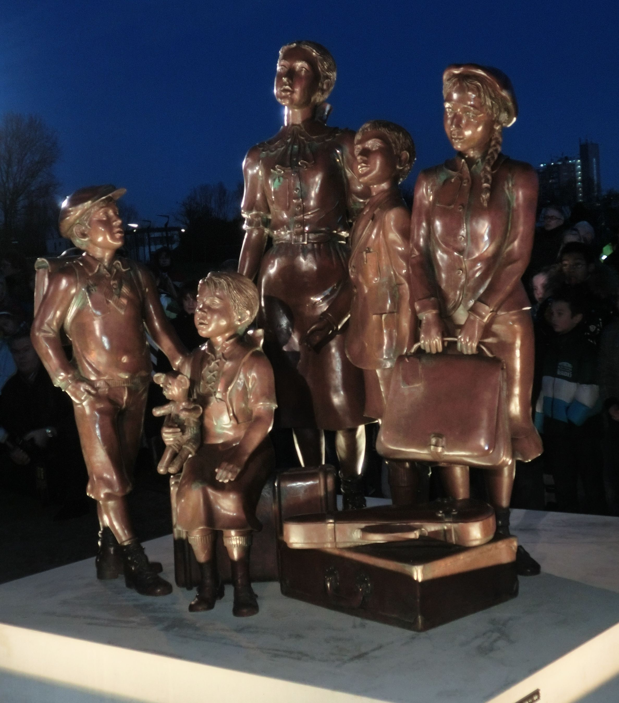 "Channel Crossing to Life, Kindertransports 1938-1939" Einweihung des Denkmales "Kindertransporte" am 30.11.2011 in Hoek van Holland (NL), wenige Augenblicke nach der Enthüllung. An der Einweihung nahmen mehr als 40 "Kinder" teil, die 72 Jahre nach ihrer Rettung noch einmal zum Fährhafen kamen, von dem sie damals nach England übersetzten.